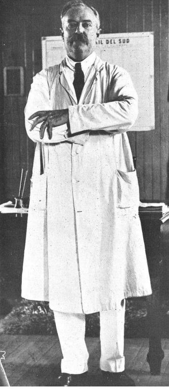 Foto de Mateo Banks en la revista Caras y Caretas en 1923, con motivo de una entrevista.